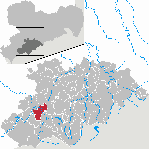 Lauter-Bernsbach im Erzgebirgskreis, Sachsen